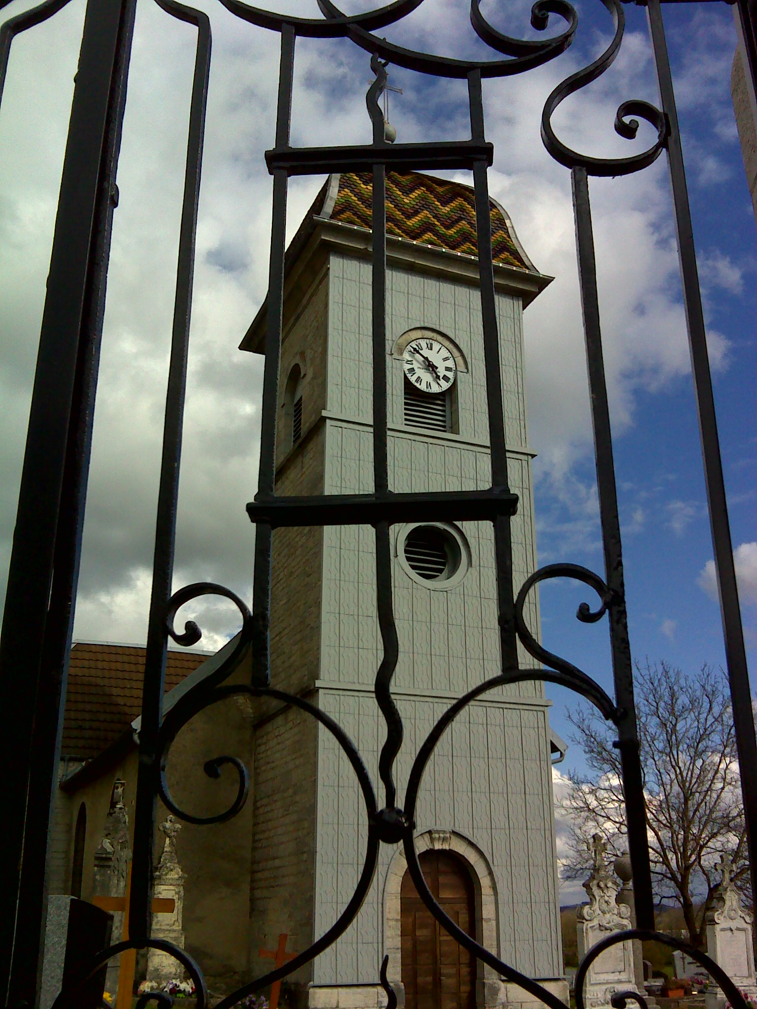 25340 Crosey-le-Petit, France